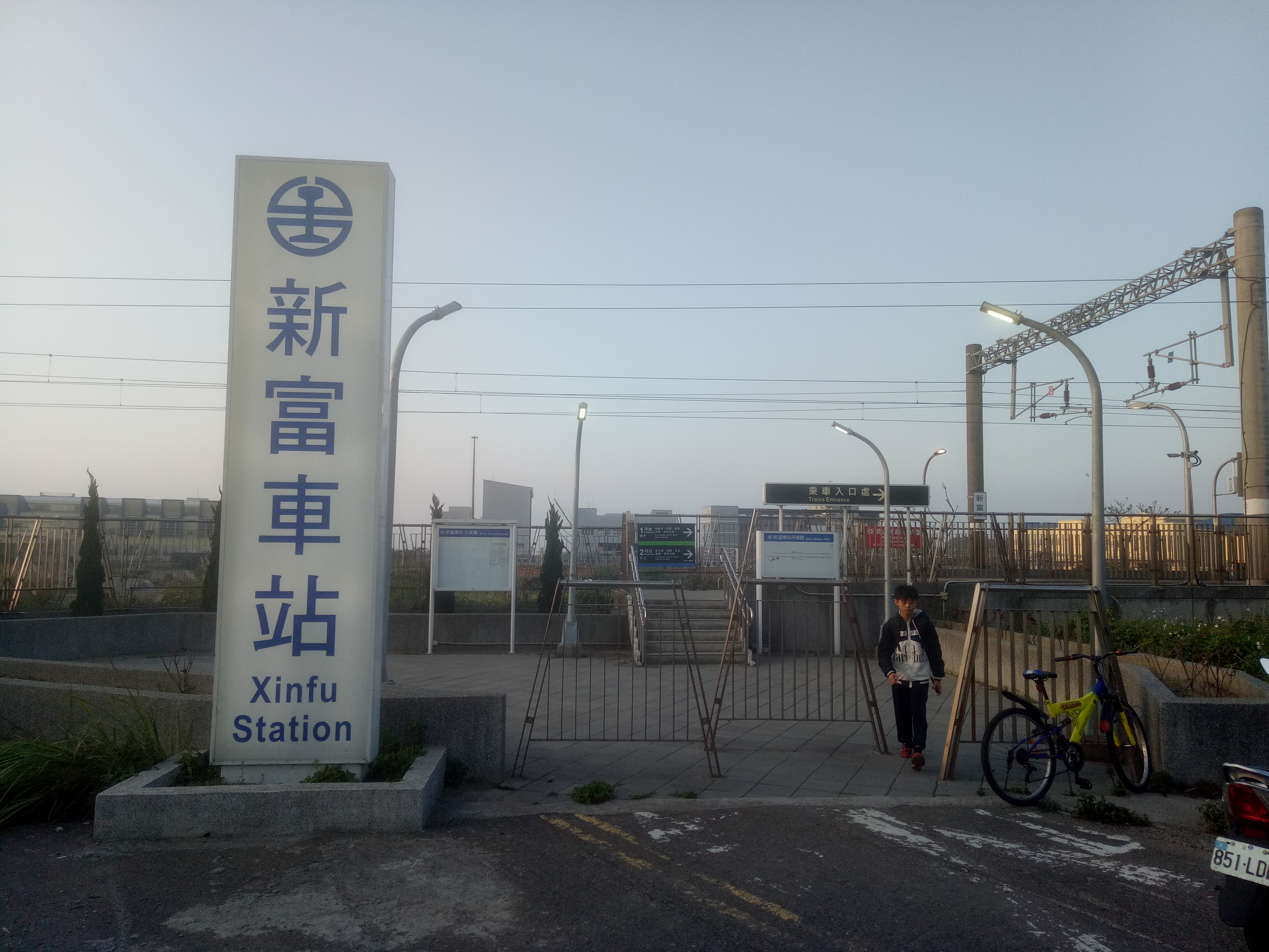 新富車站，位於台灣桃園市楊梅區富岡里，是臺灣鐵路管理局縱貫線的鐵路車站。